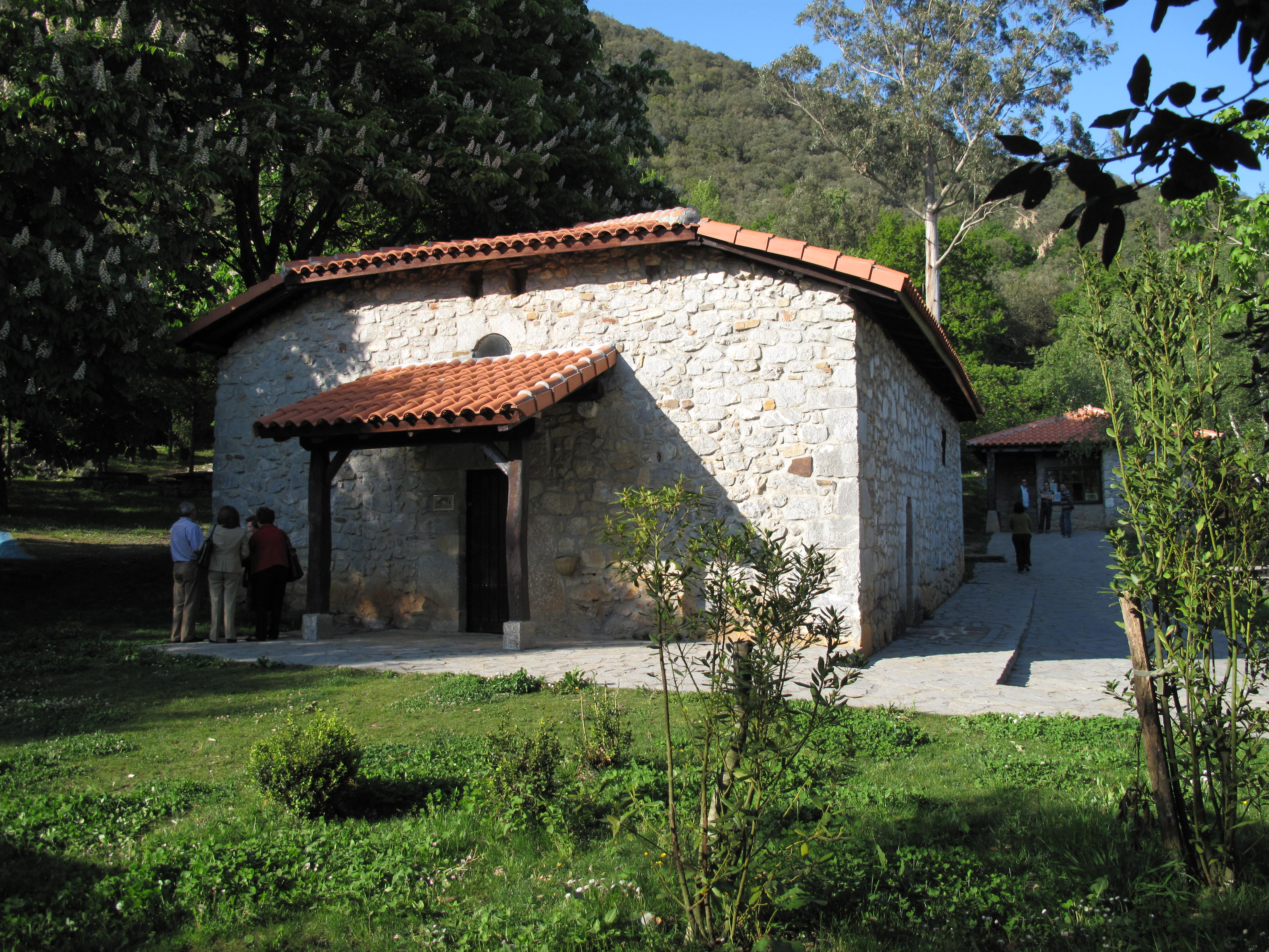 Ermita San Mames, en Kortezubi, Vizcaya